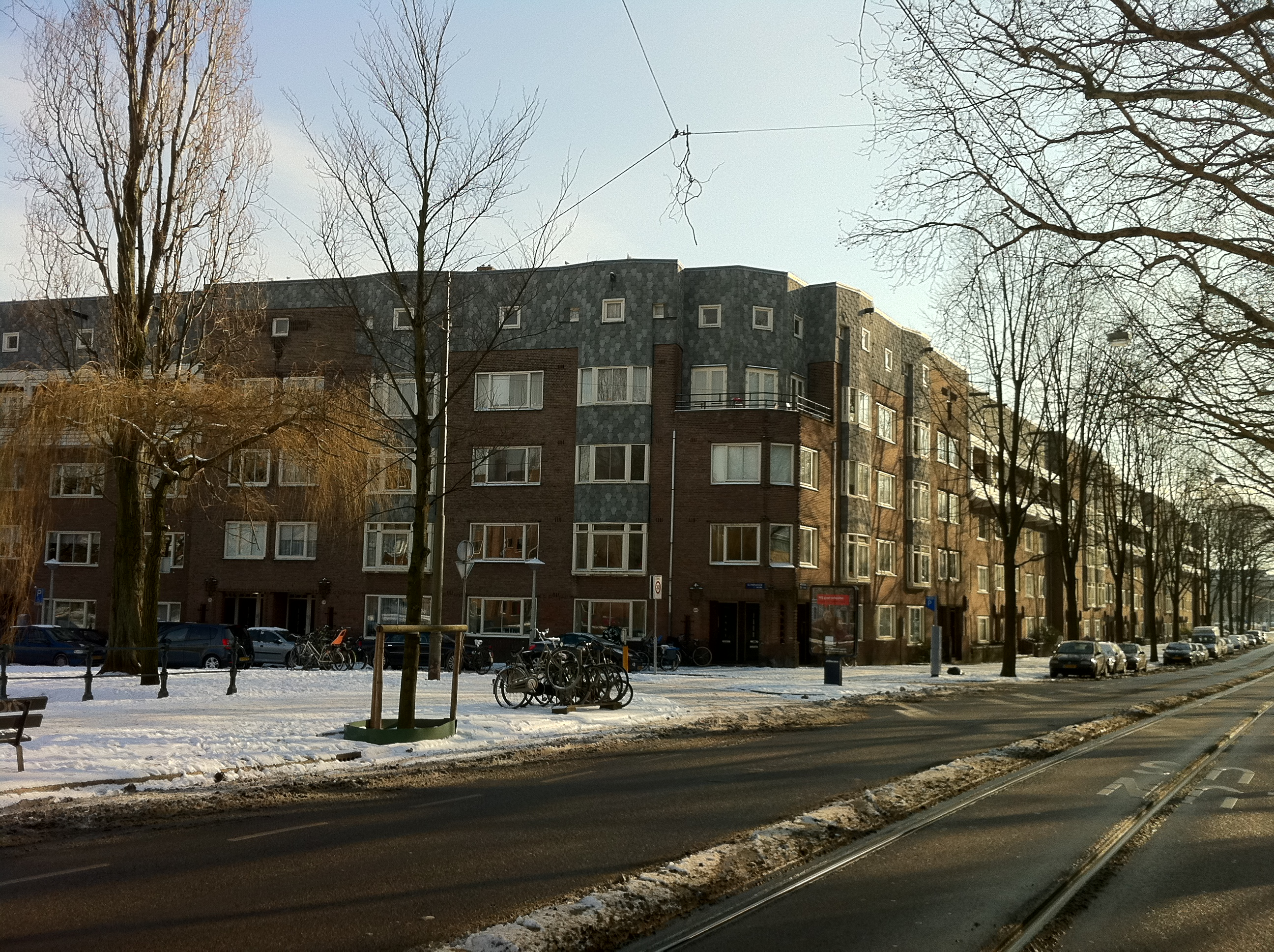 Amsterdam-Zuid. Olympiakade, Amstelveenseweg. Gebouwd door woningbouwvereniging Patrimonium